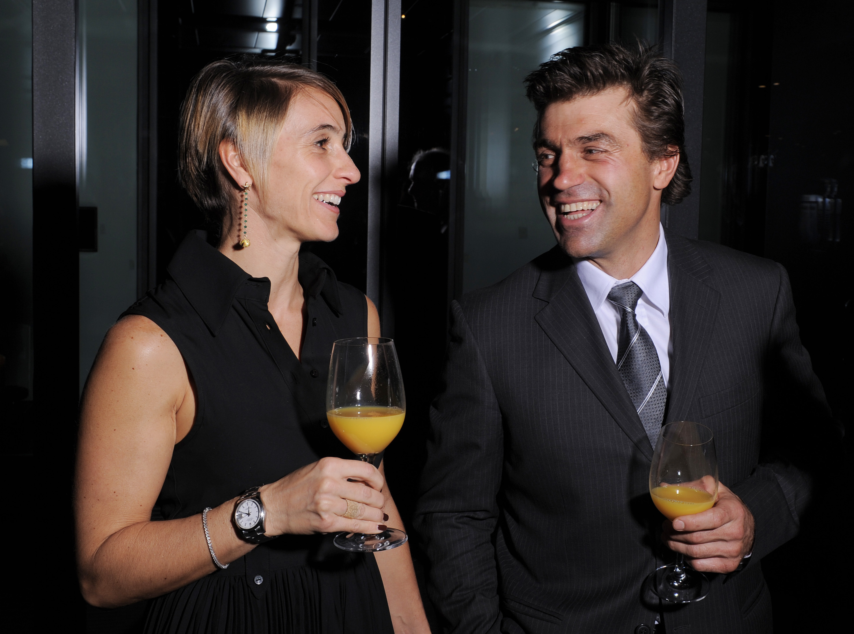 Davos, 09.11.2012. Sport, 10. Internationale Sportnacht Davos 2012. Ex-Abfahrtsass Kristian Ghedina in charmanter Begleitung von Patrizia Auer. Copyright by: foto-net / Kurt Schorrer